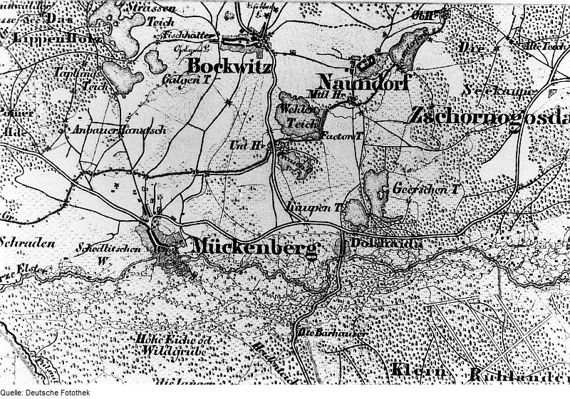 Original image description from the Deutsche Fotothek Lauchhammer. Topographische Karte vom Preußischen Staate, Bl. 249 Ortrand, aufgen. 1847, Nachträge 1862